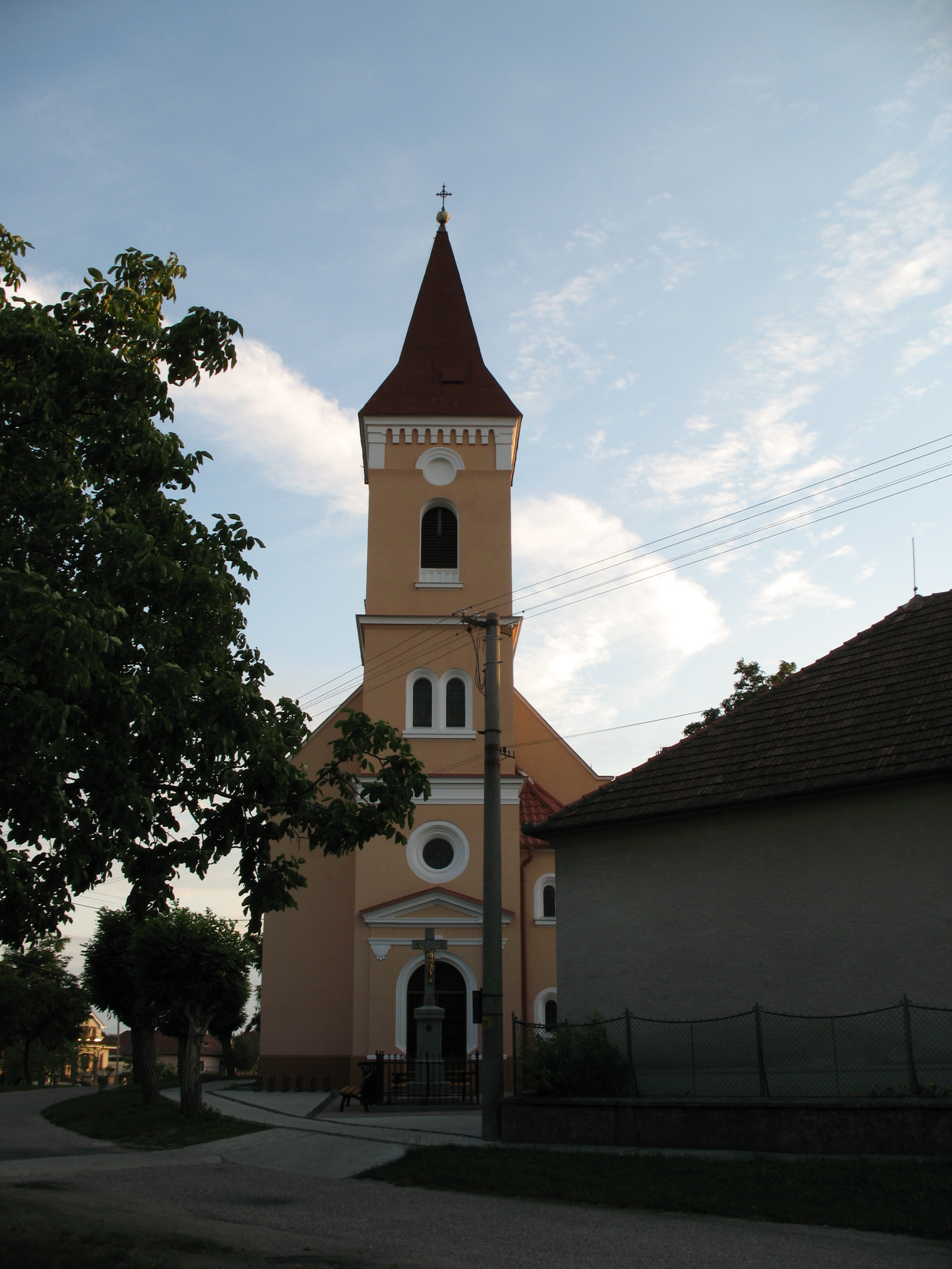 Dolné Saliby - rímsko-katolícky kostol